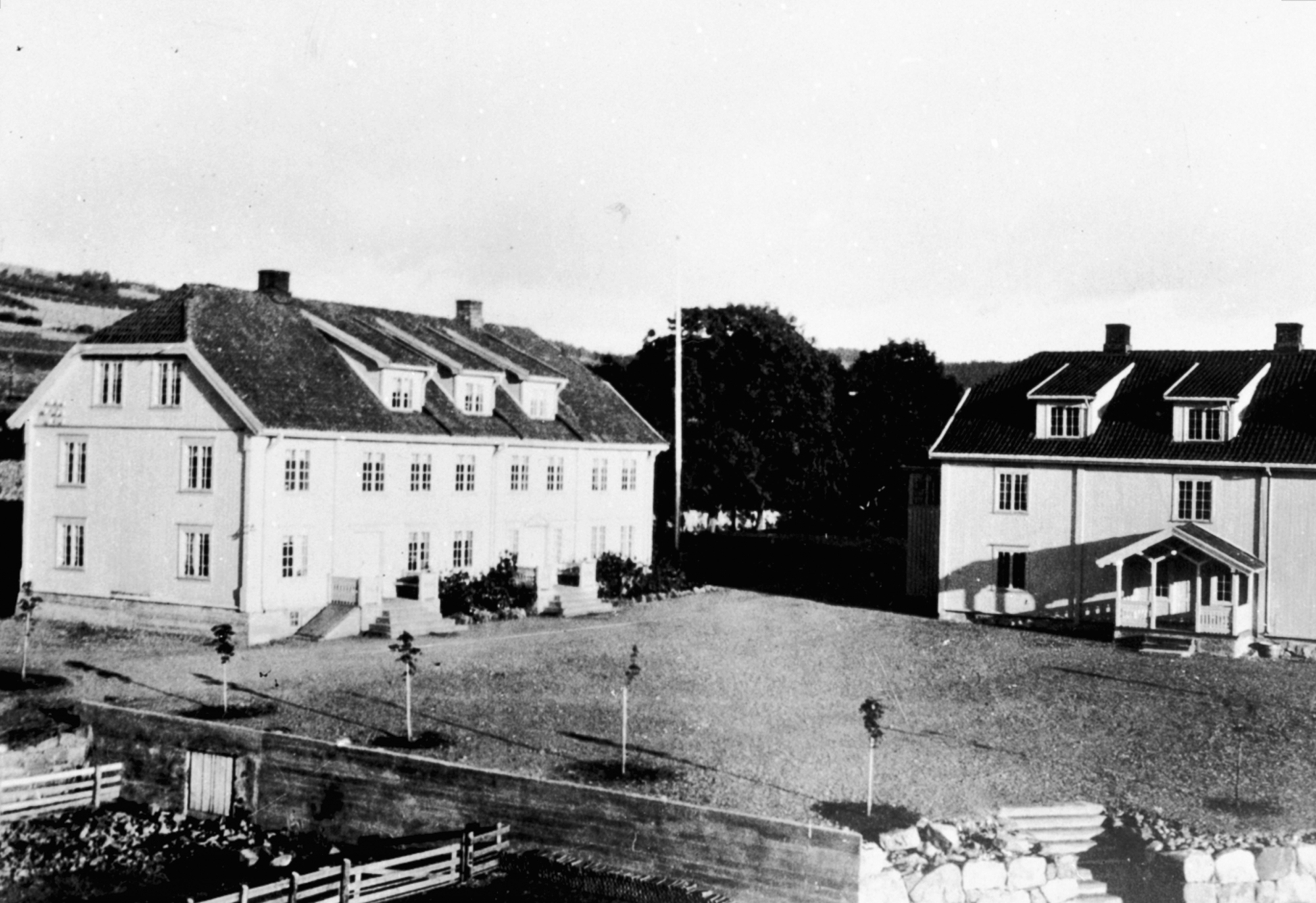 Hovedbygningene på Vea fotografert en gang mellom 1936 og 1938.